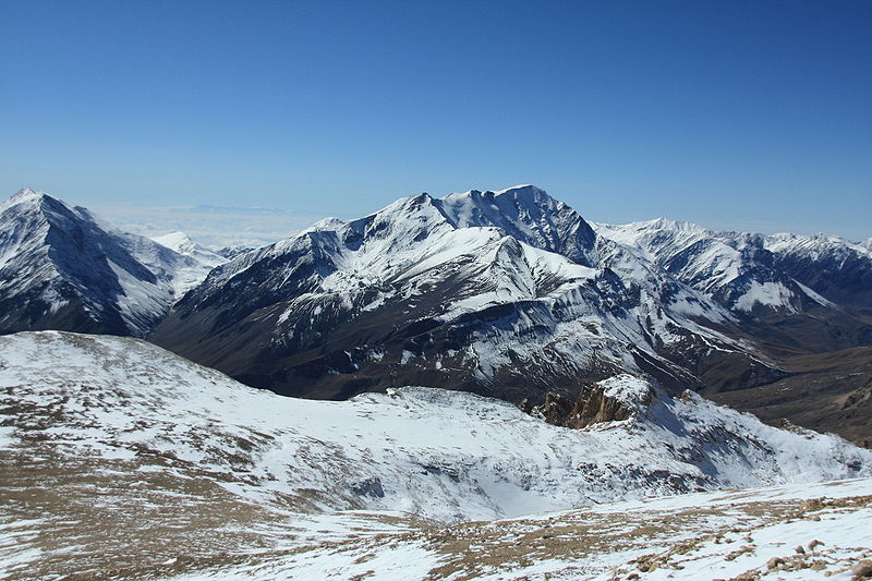 Гора Базардюзю